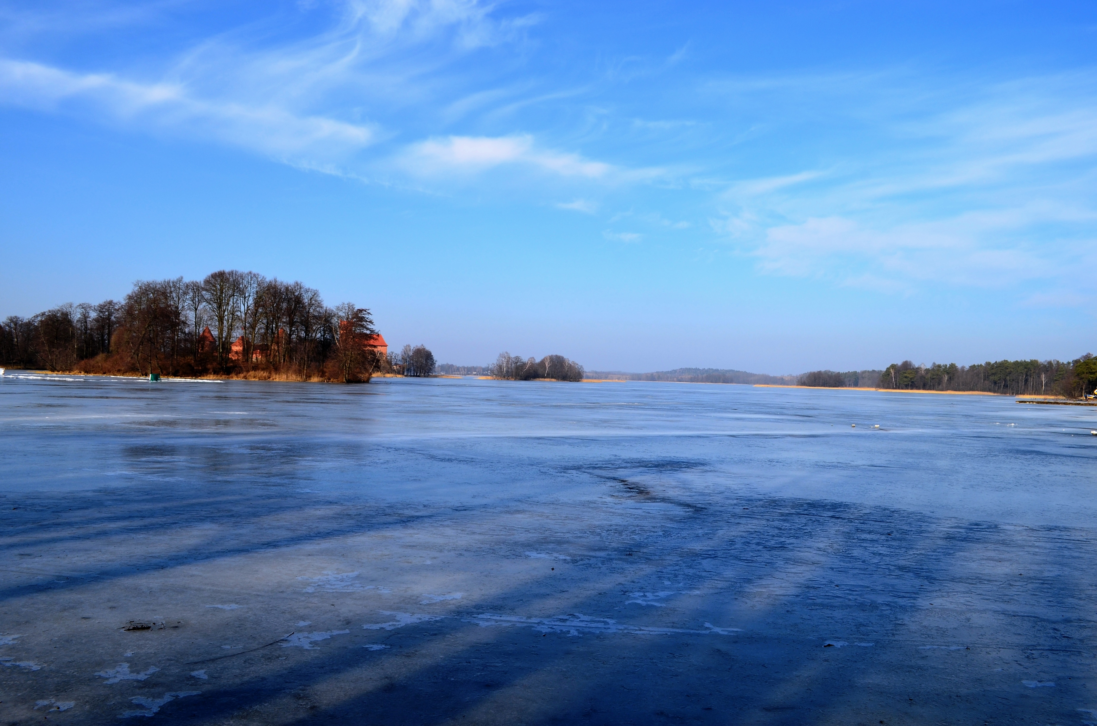 Galvės ežeras nuo pietinio kranto, Trakai